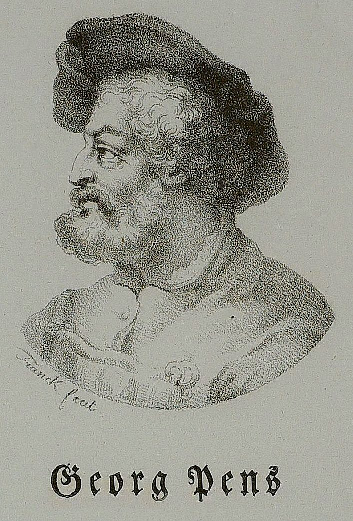 Portrait des Malers Georg Pencz; Kupferstich von Maximilian Franck (1813)